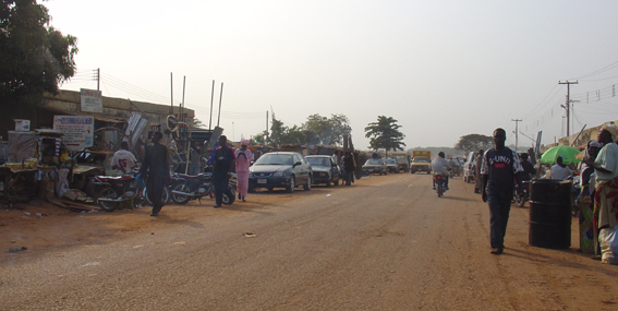 Kuje, Nigeria